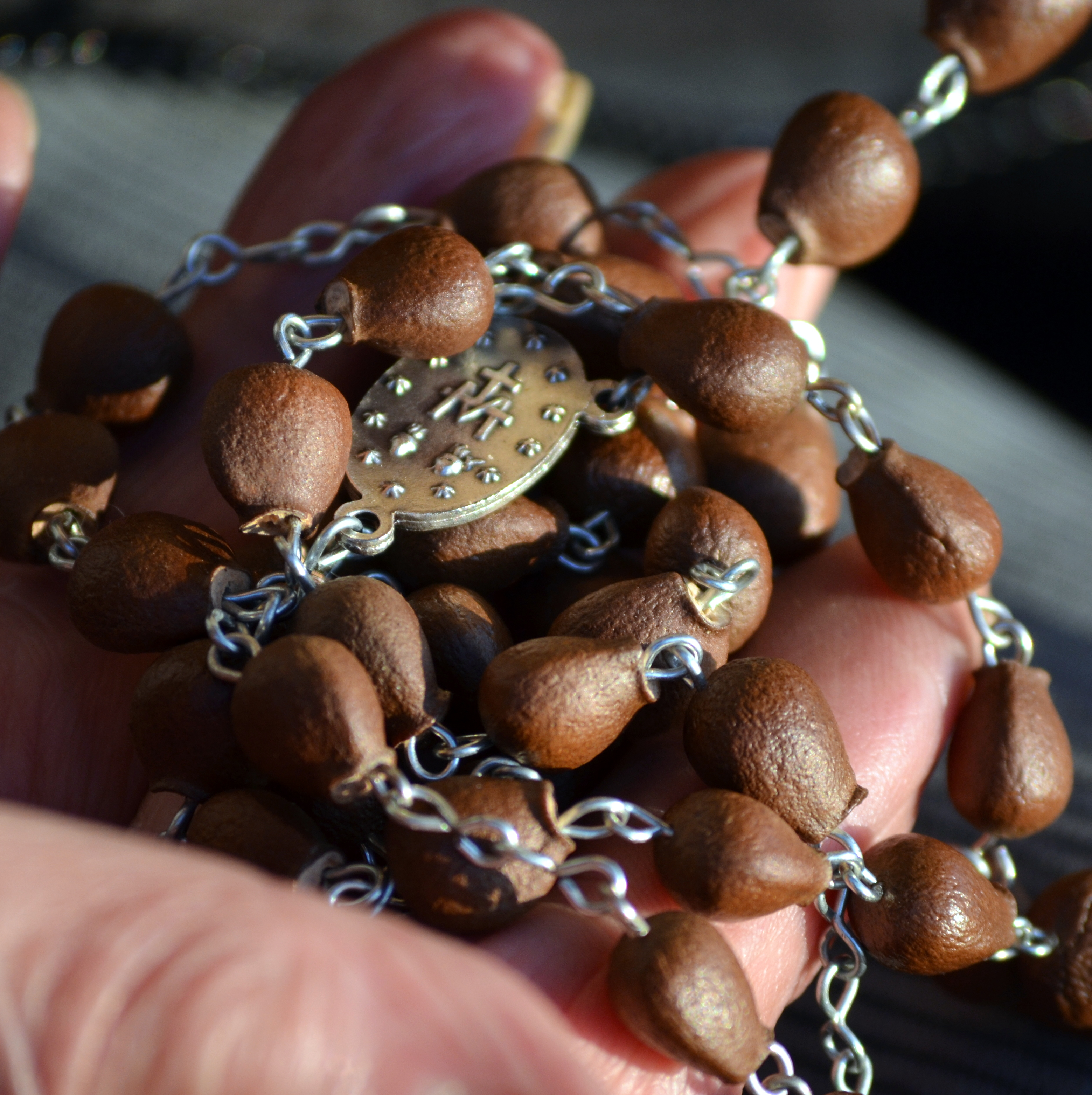 Beskidischer Pimpernuß Rosenkranz gekettelt